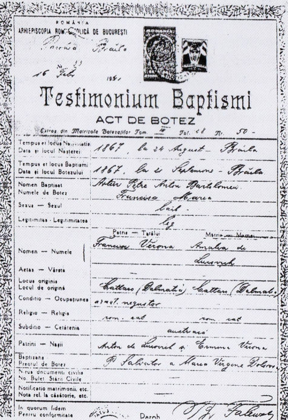 Arthur Verona - Certificat de nastere